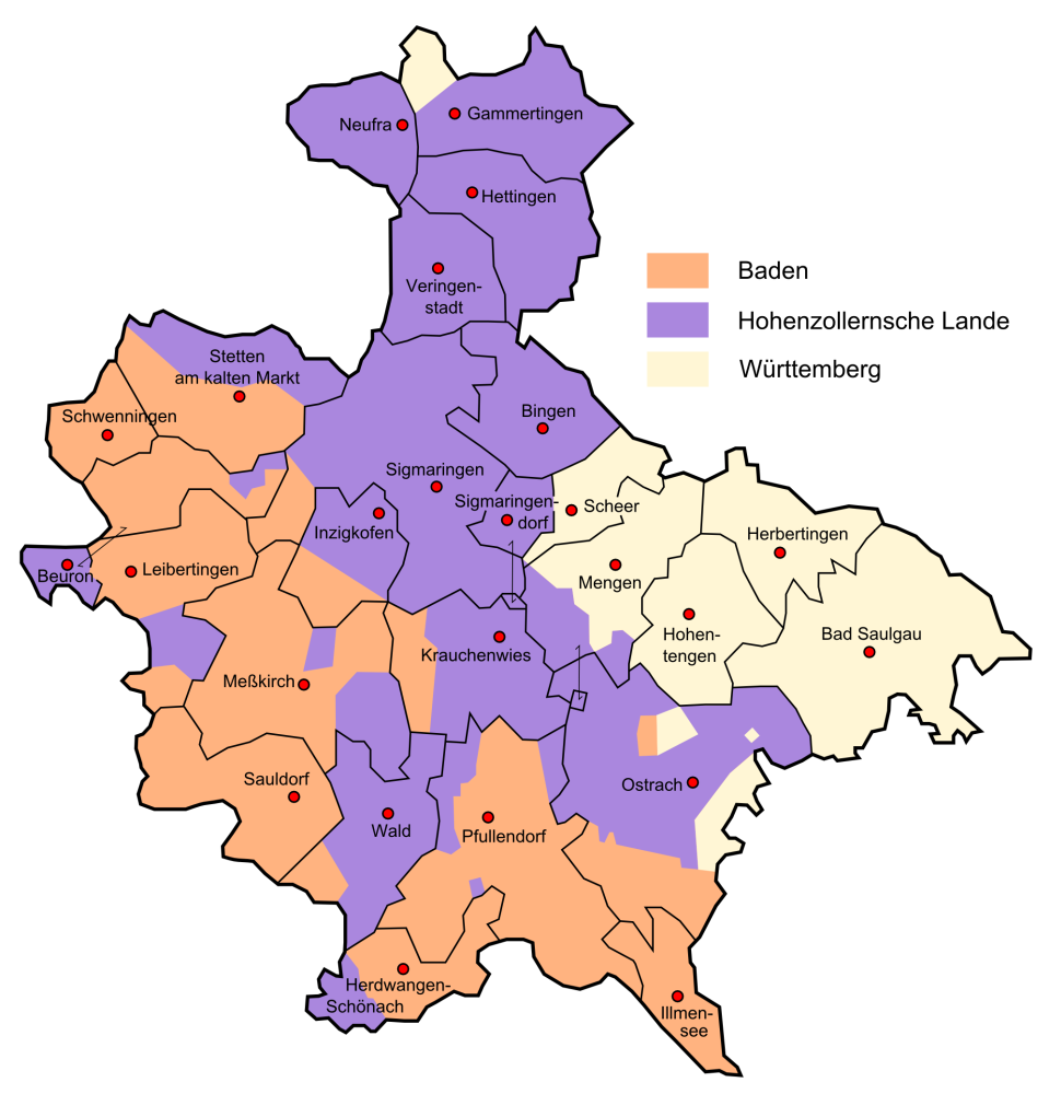 Der Landkreis Sigmaringen als Teil von Baden, der Hohenzollernschen Lande und Württembergs